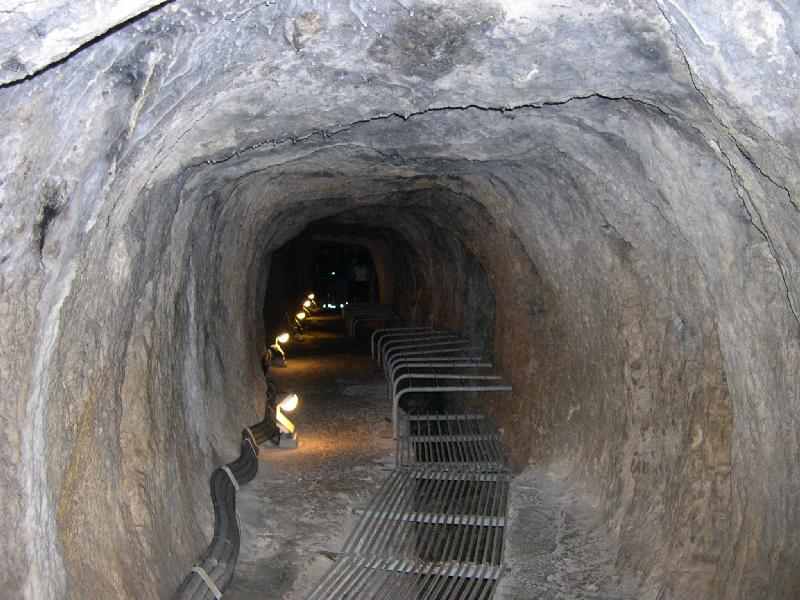 Túnel construido por el arquitecto Eupalinos en la antigua ciudad de Samos (hoy: Pythagorio)